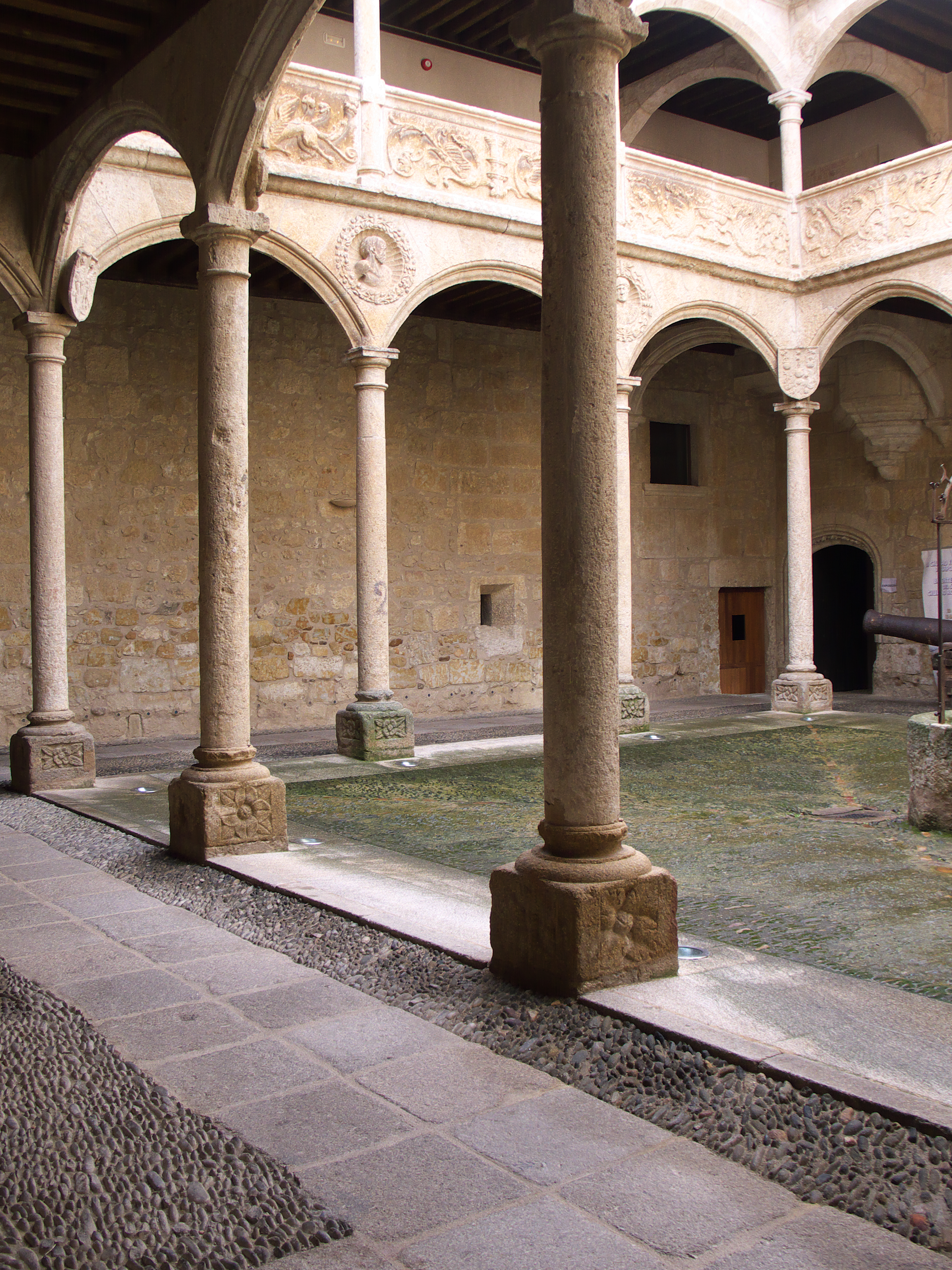 Magnífico patio plateresco de los Águila, alcaides de la fortificada ciudad.